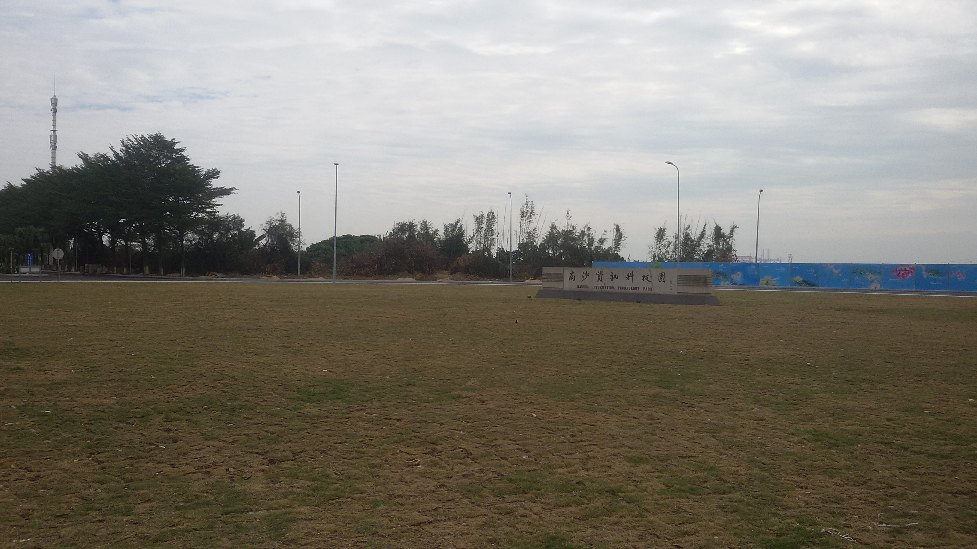 粵語: 南沙資訊科技園